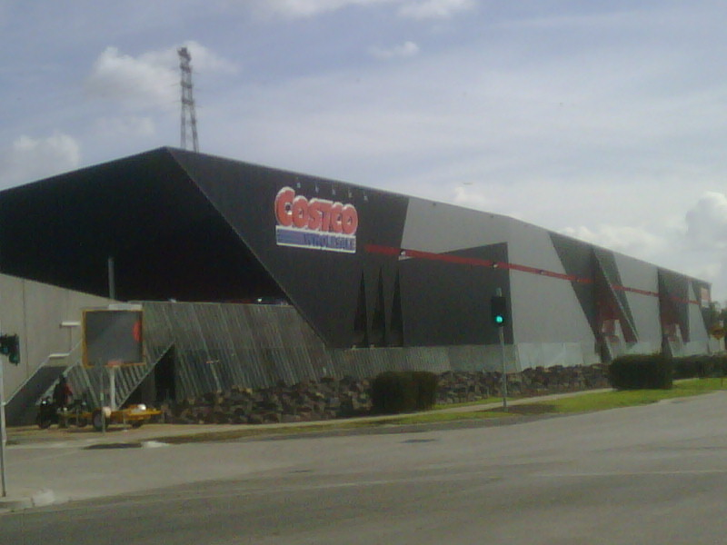 IMG00135-20090817-1424